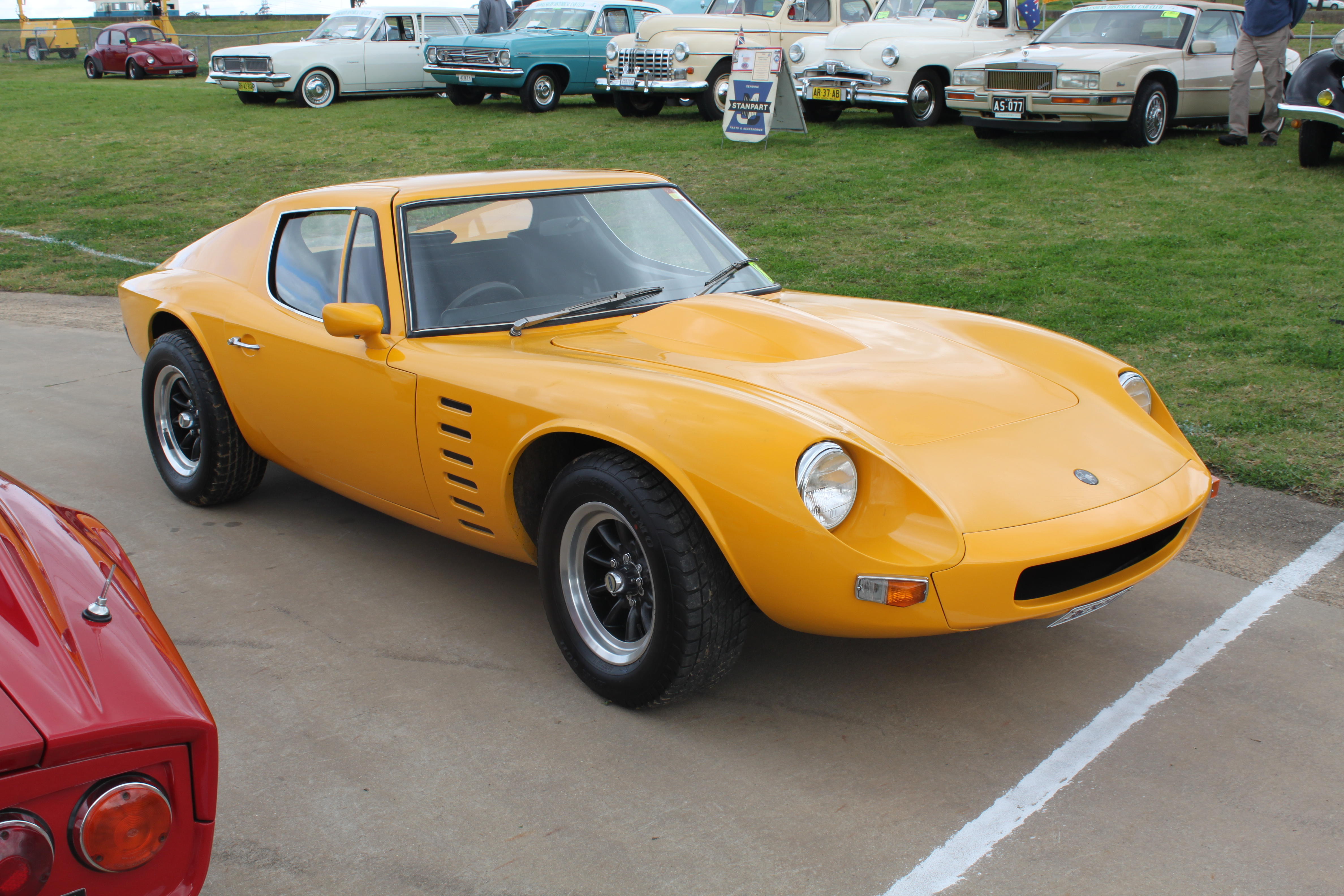 Bolwell Nagari